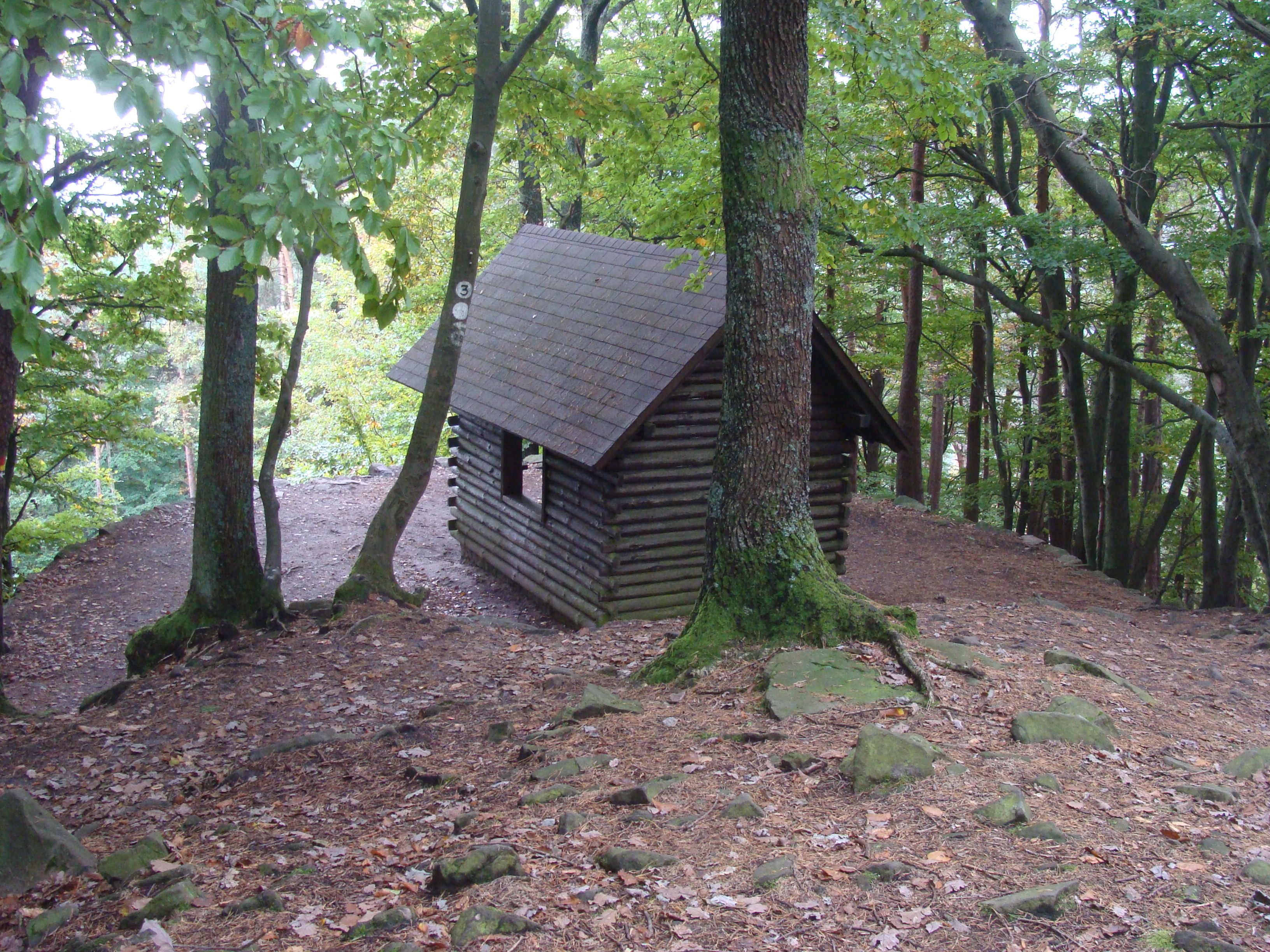 Hüttenberghütte am Hüttenberg/Kalmit (Haardt/Pfälzerwald)